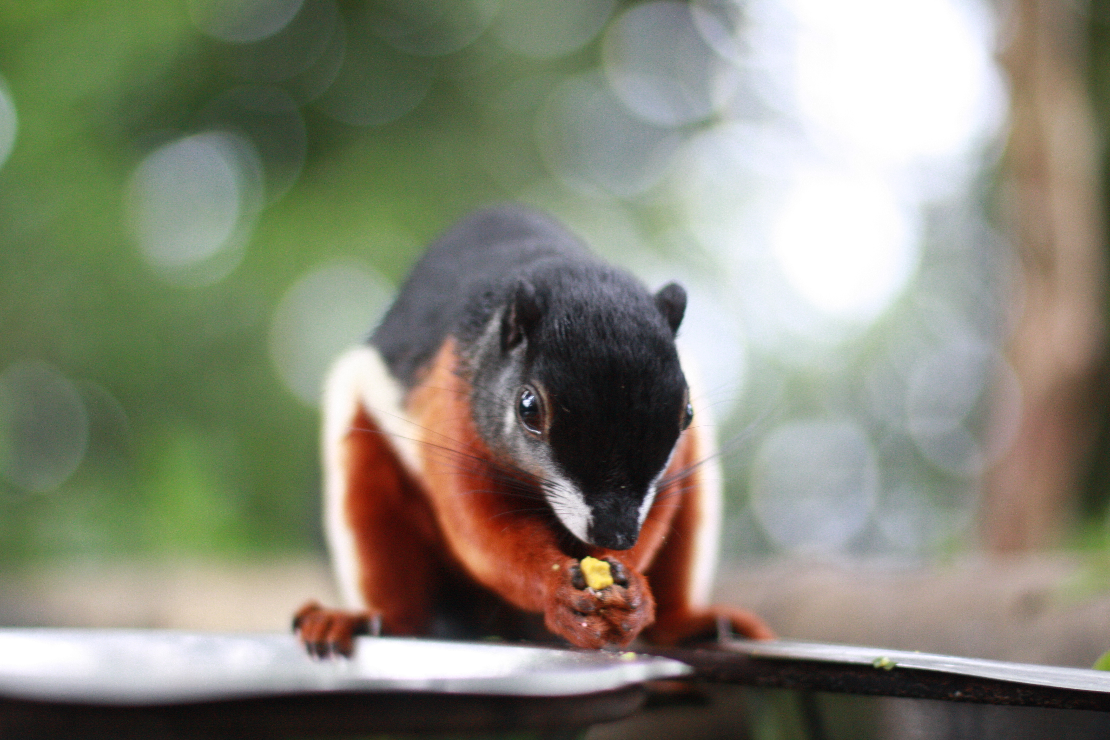 Praktekorn (Callosciurus prevostii rafflesi) i Randers Regnskov